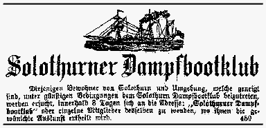 Annonce zur Rettung des Solothurner Dampfbootclubs